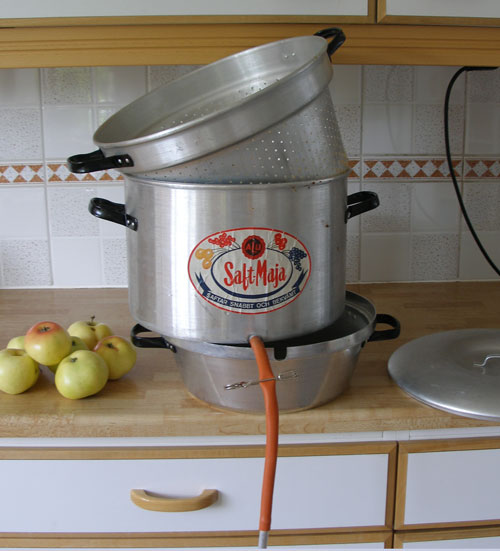 Saftmaja i 3 delar